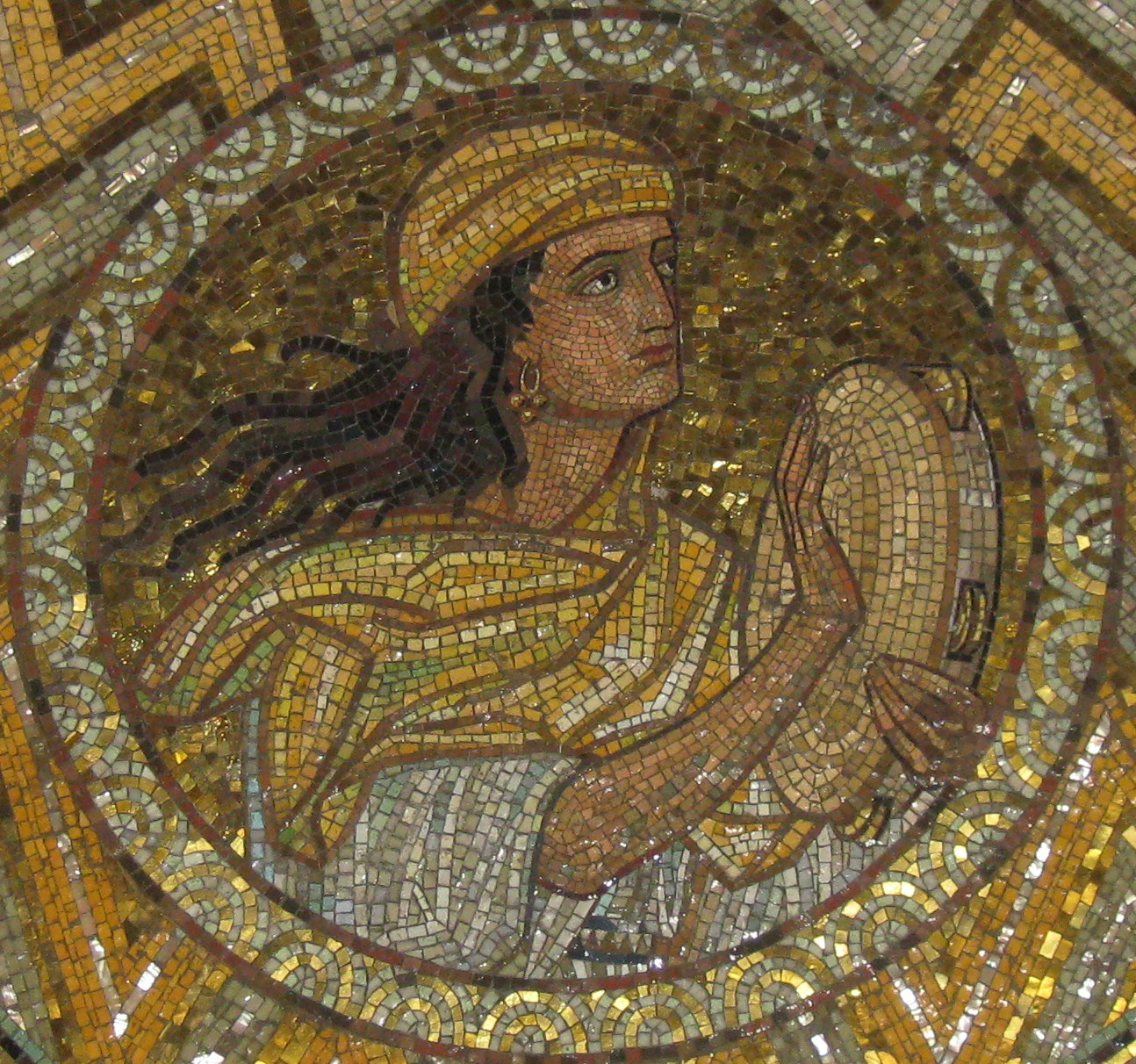 The Dormition Church on Mount Zion in Jerusalem כנסיית הדורמיציון על הר ציון בירושלים